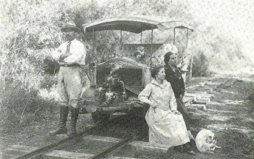 Autovia cerca de Pirane, Formosa